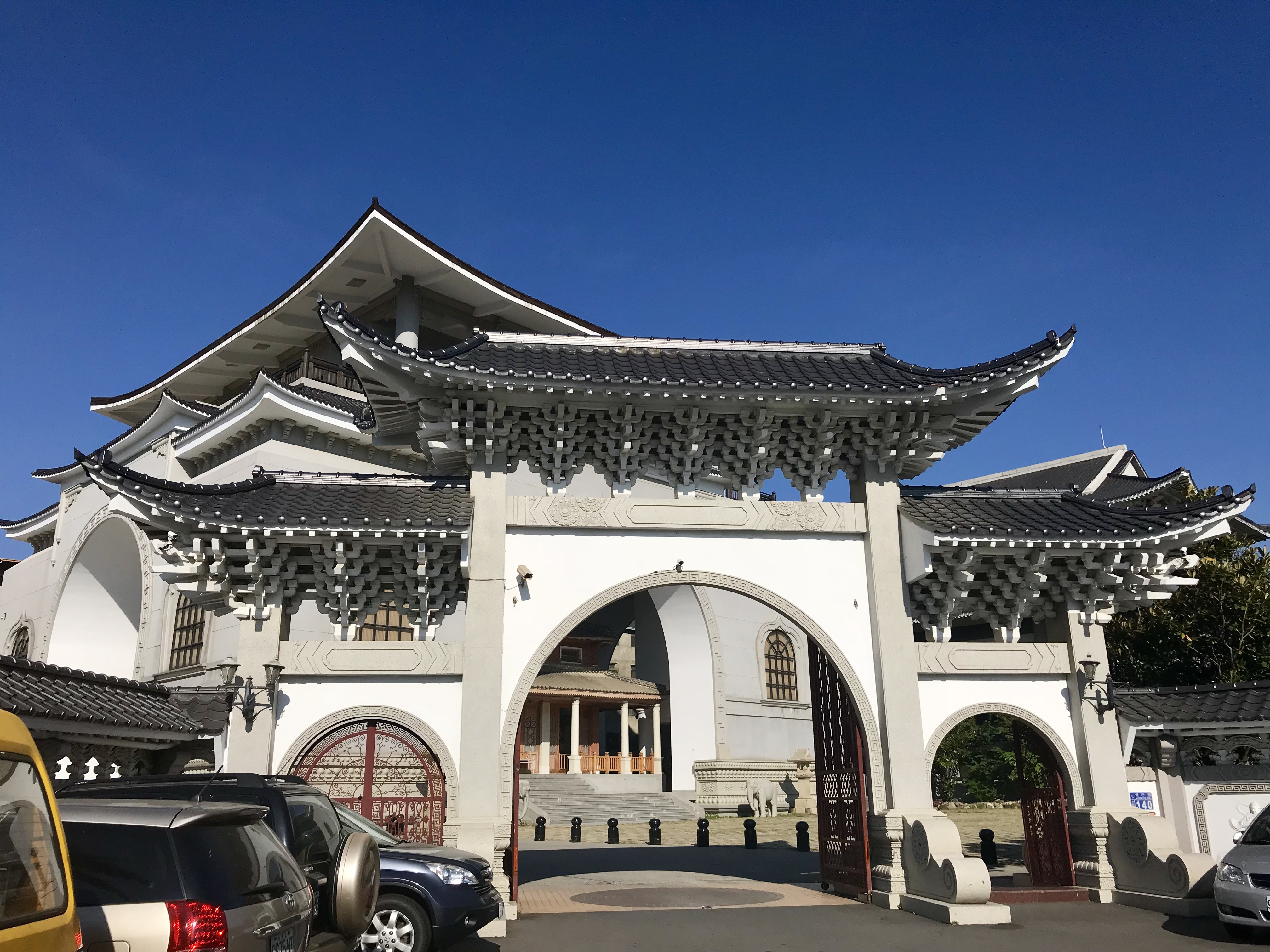 中文（台灣）: 寶覺寺牌樓